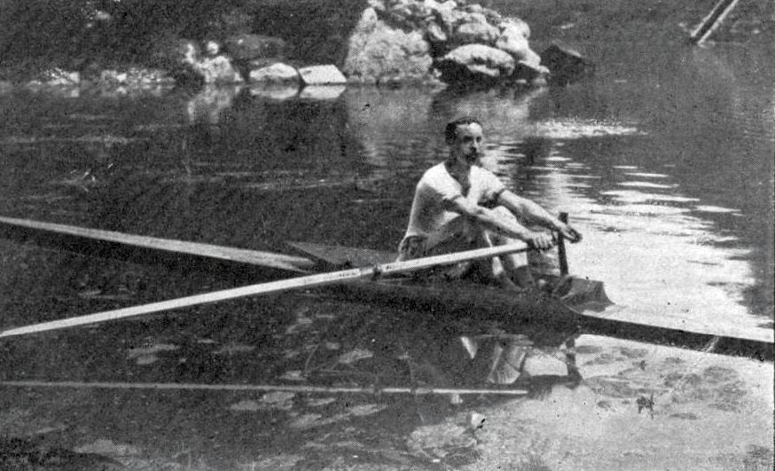 Émile Lepron, champion de France en skull en 1890, 1892 et 1893, de la Marne de 1888 à 1894, et de la Seine en 1889 et 1892 (pour le Rowing-Club) - Palmarès : source Livre Encyclopédie des sports. Volume 4 / sous la direction de Philippe Daryl ("le sport de l'aviron par un ex-champion), 1895 et rééd., éd. Librairies-Imprimeries réunies, Paris, p.204 à 205. 